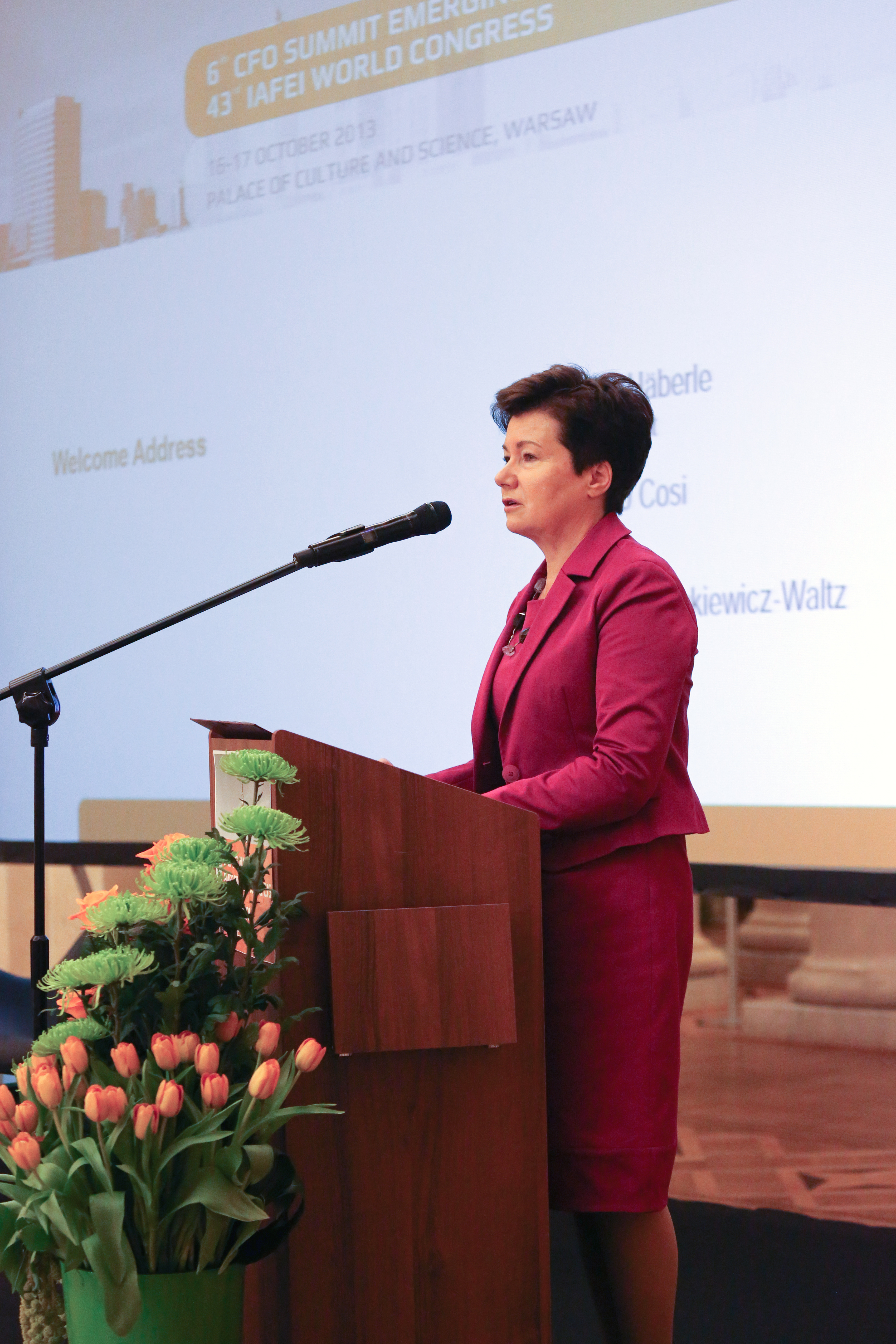 Hanna Gronkiewicz-Waltz as speaker at the 43rd IAFEI World Congress, October 16th, 2013 in Warsaw, Palace of Culture